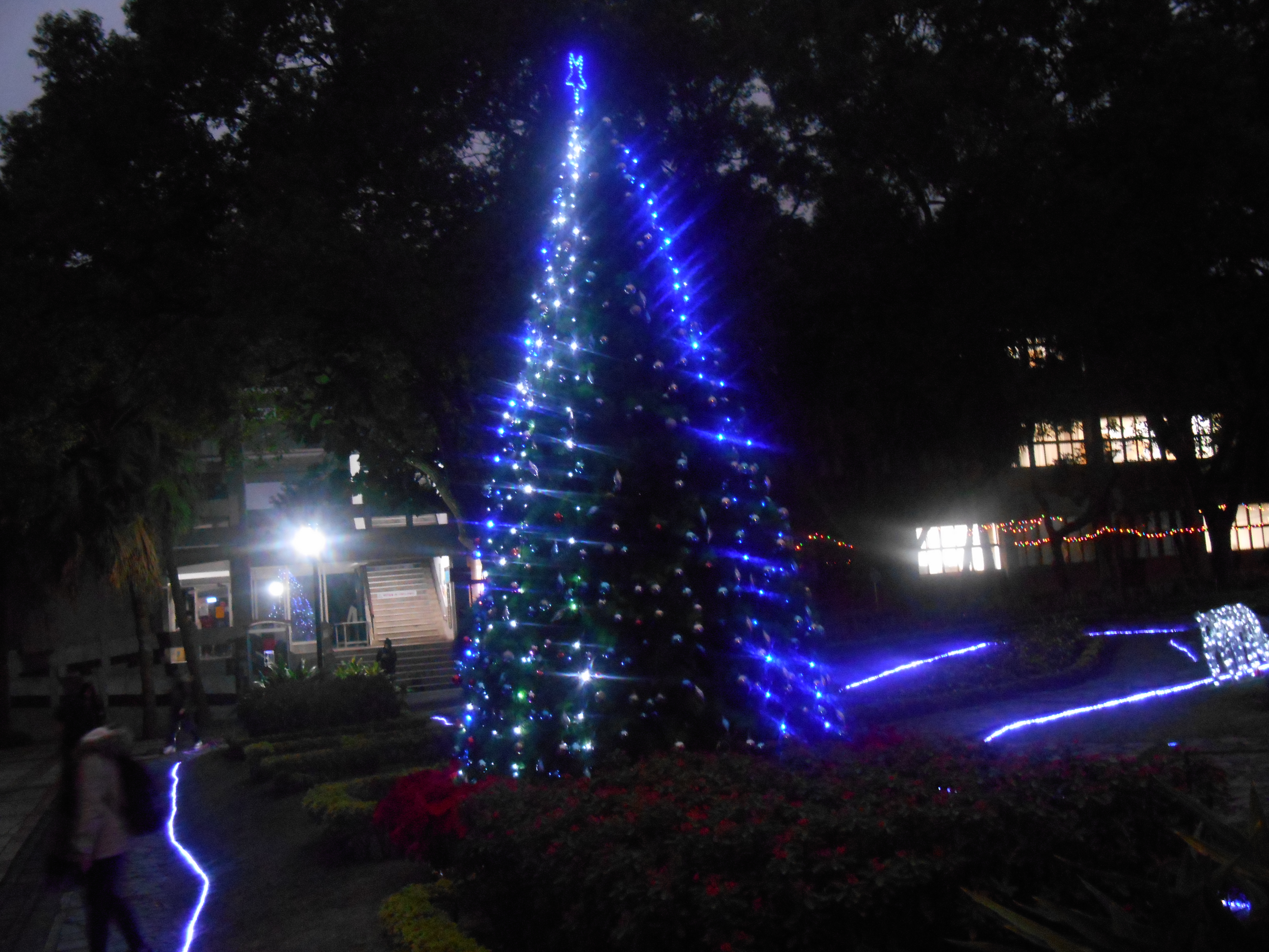 真理大學-night christmas tree